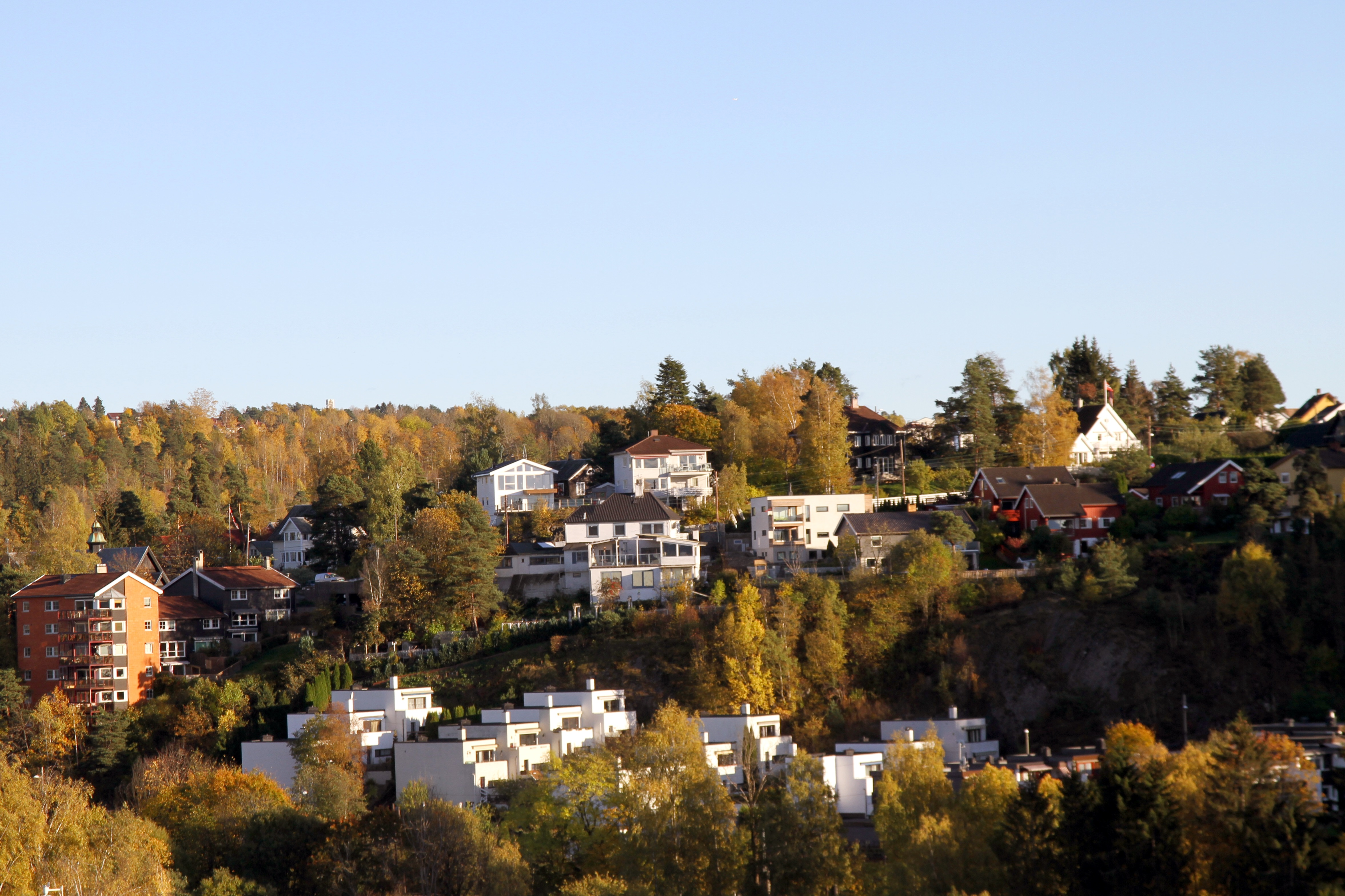 Høyenhallveien sett fra Etterstad.